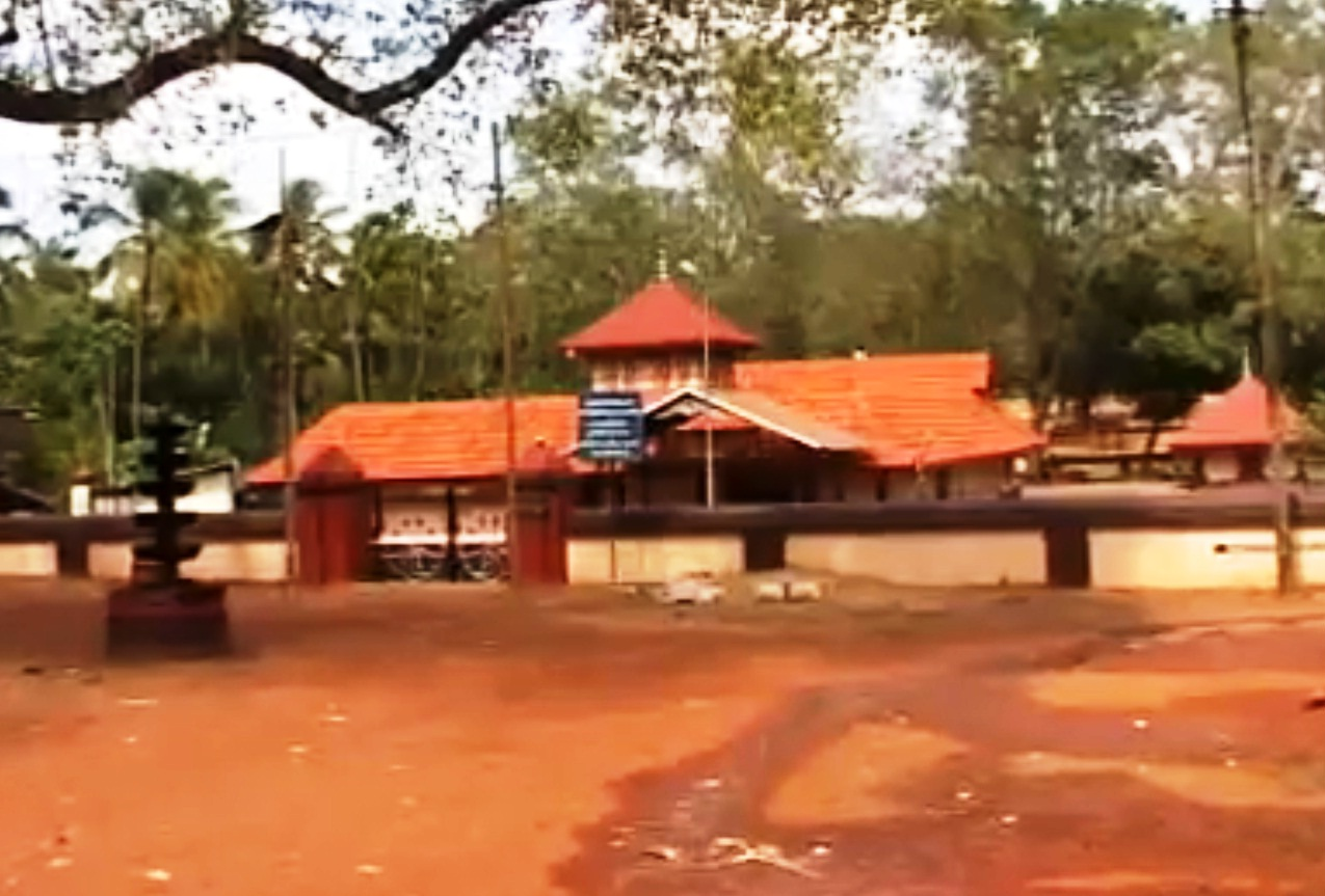 കാട്ടകാമ്പാൽക്ഷേത്രം-ഭഗവതി നട